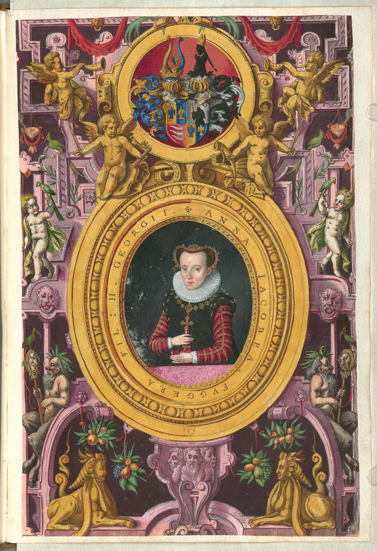 Fuggerorum et Fuggerarum imagines wurde 1588 von Philipp Eduard Fugger beim Kupferstecher Dominicus Custos in Auftrag gegeben. Das Werk enthält mit Aquarell- und Gouache-Farbe kolorierte Stiche der Mitglieder der Fugger von der Lilie. Der Druck von 1618 stellt das einzige kolorierte Exemplar dar. Anna Jacobäa, Freiin Fugger (1547-1587), Tochter des Georg Fugger (1518-1569), 1561-1582 Nonne im Dominikanerinnenkloster St. Katharina, erste Ehefrau Graf Heinrichs VII. von Ortenburg (1556-1603)